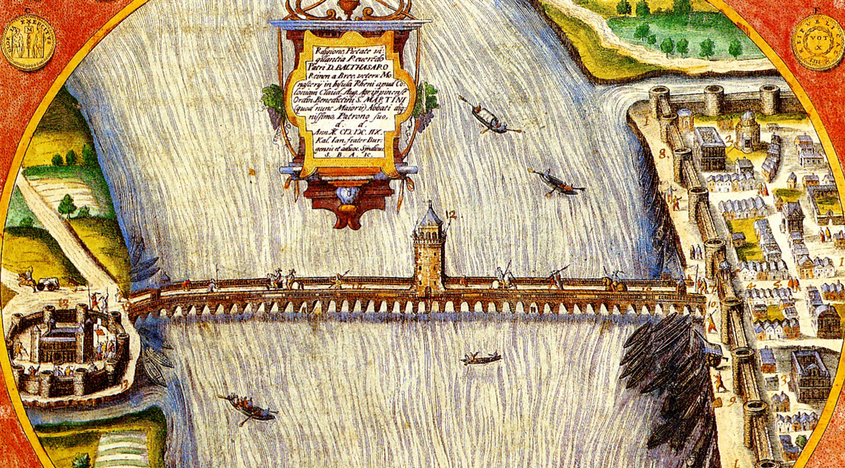 CCAA, Konstantinbrücke. Stephan Brölmanns später von einem Unbekannten kolorierte Zeichnung von 1608. Originaltitel: „De ponte Constantiniano observationes ex Broelmanno“